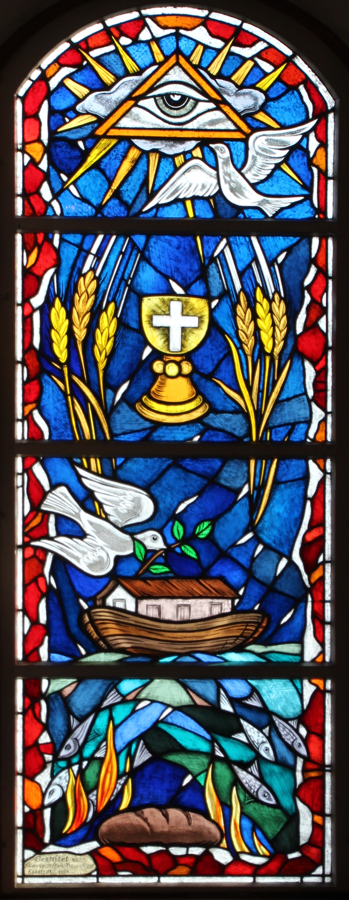 Südfenster der Ev. Kirche in Erbstadt, Nidderau, Main-Kinzig-Kreis, Hessen, Deutschland